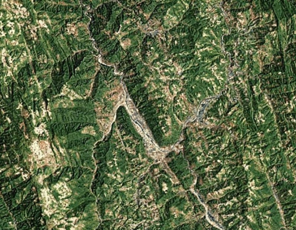 中文（中国大陆）: 中国陕西汉中镇巴县卫星地形图